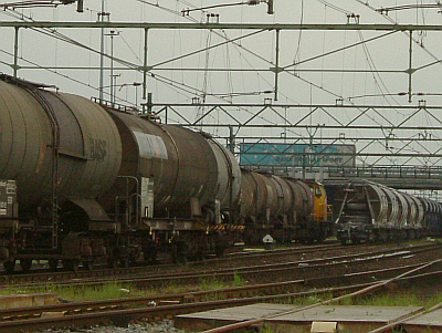 Een trein met ketelwagens. Verderop een trein met goederenwagens van het type Tapps en Fccpps. © Bastiaan Luytjes